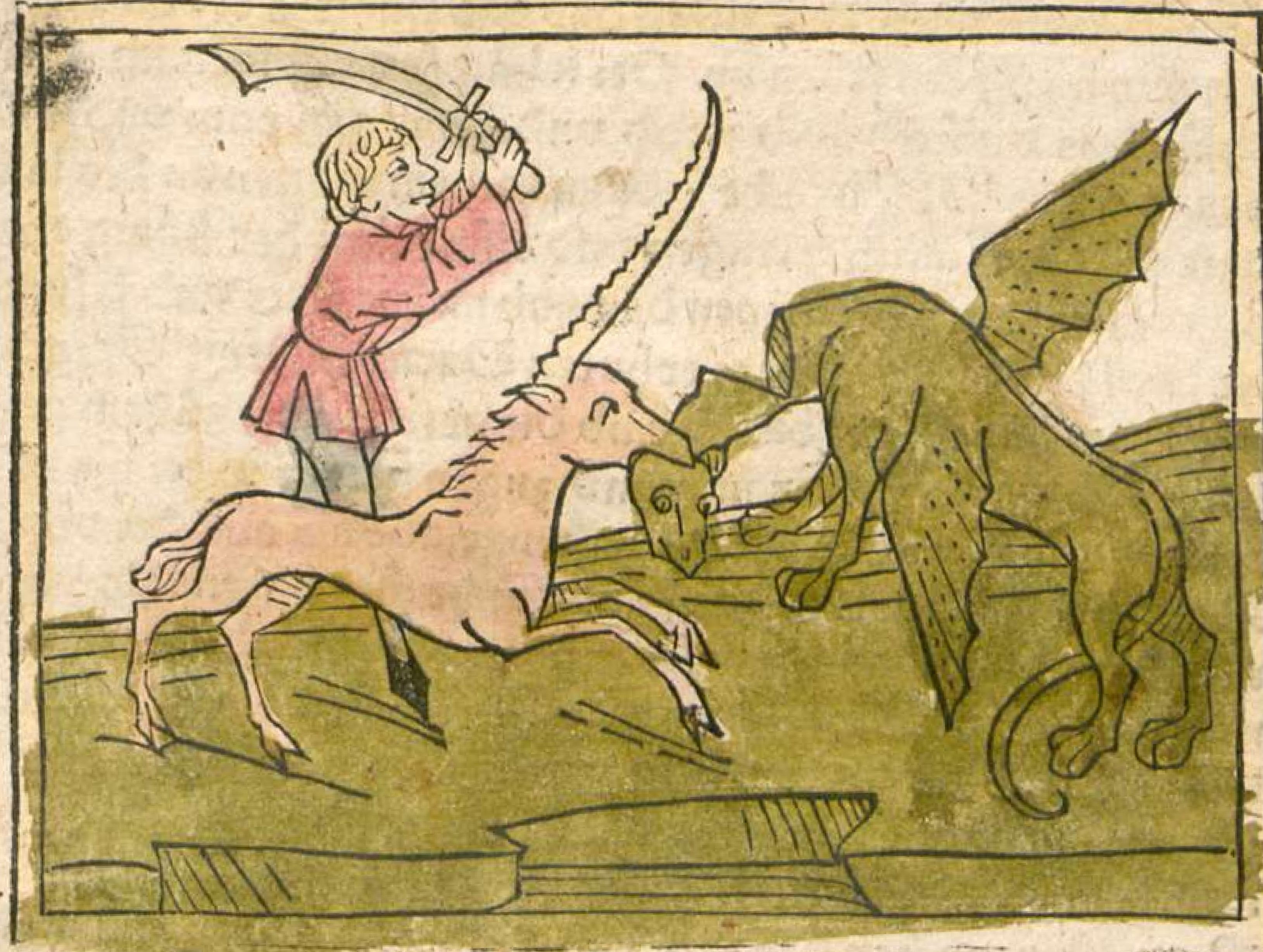 Schiltberger, Hans: Reisebuch, [Augsburg], [ca. 1477] [BSB-Ink S-201GW M34080]